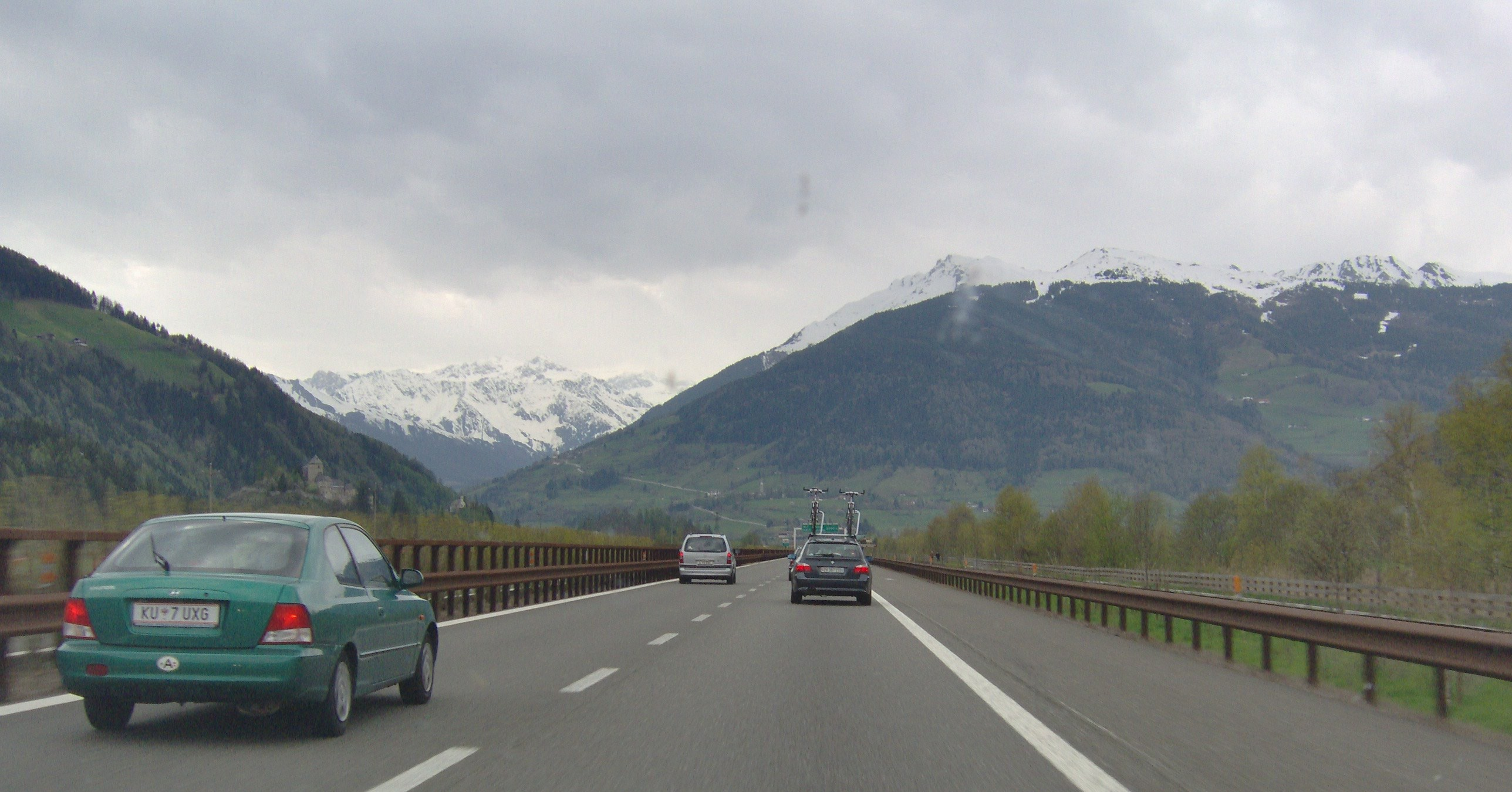 Brennerautobahn (A22) in nördlicher Richtung, nahe Burg Reifenstein bei Sterzing